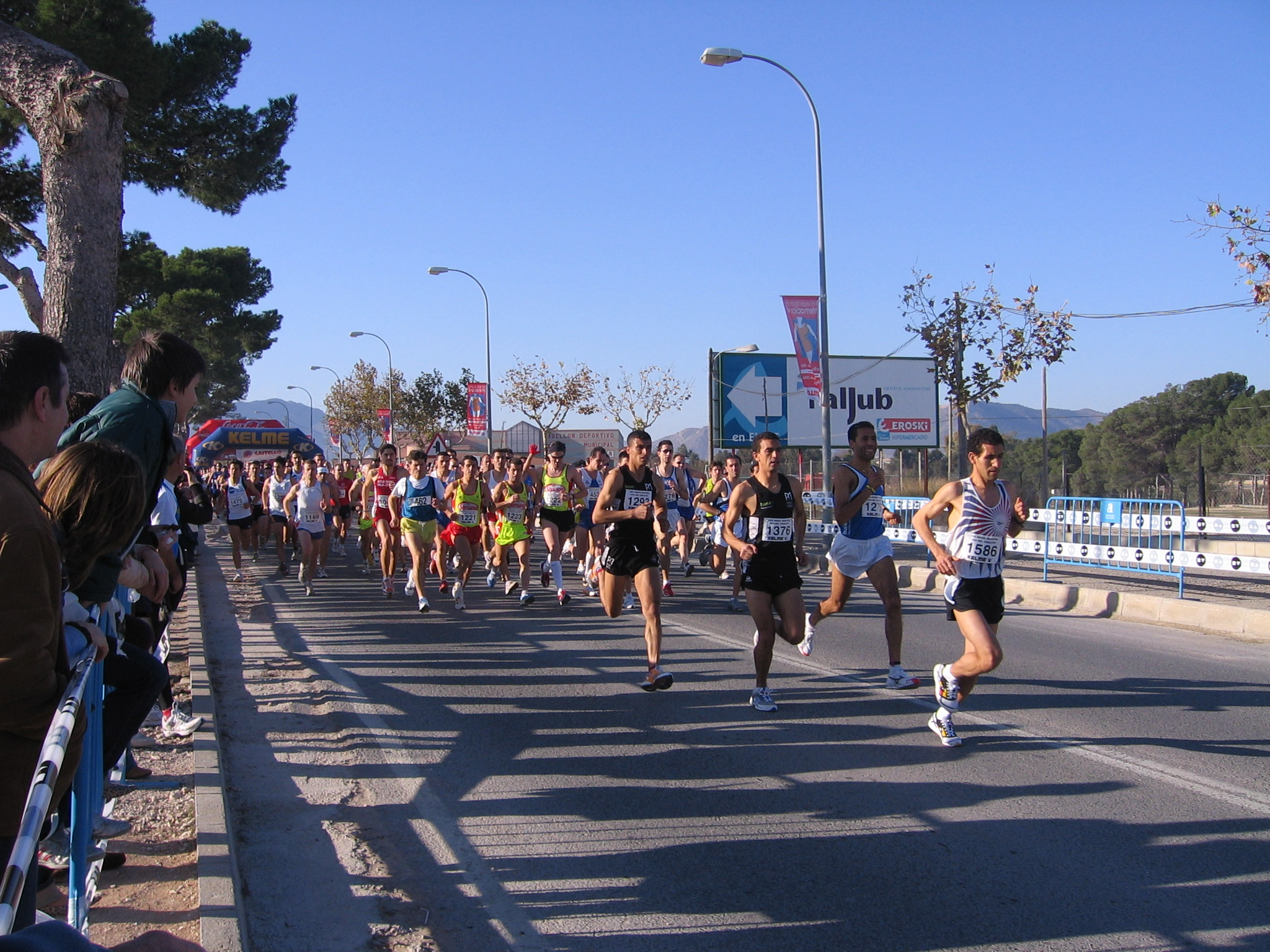 Salida de la Media Maratón de Aspe. Año 2006.